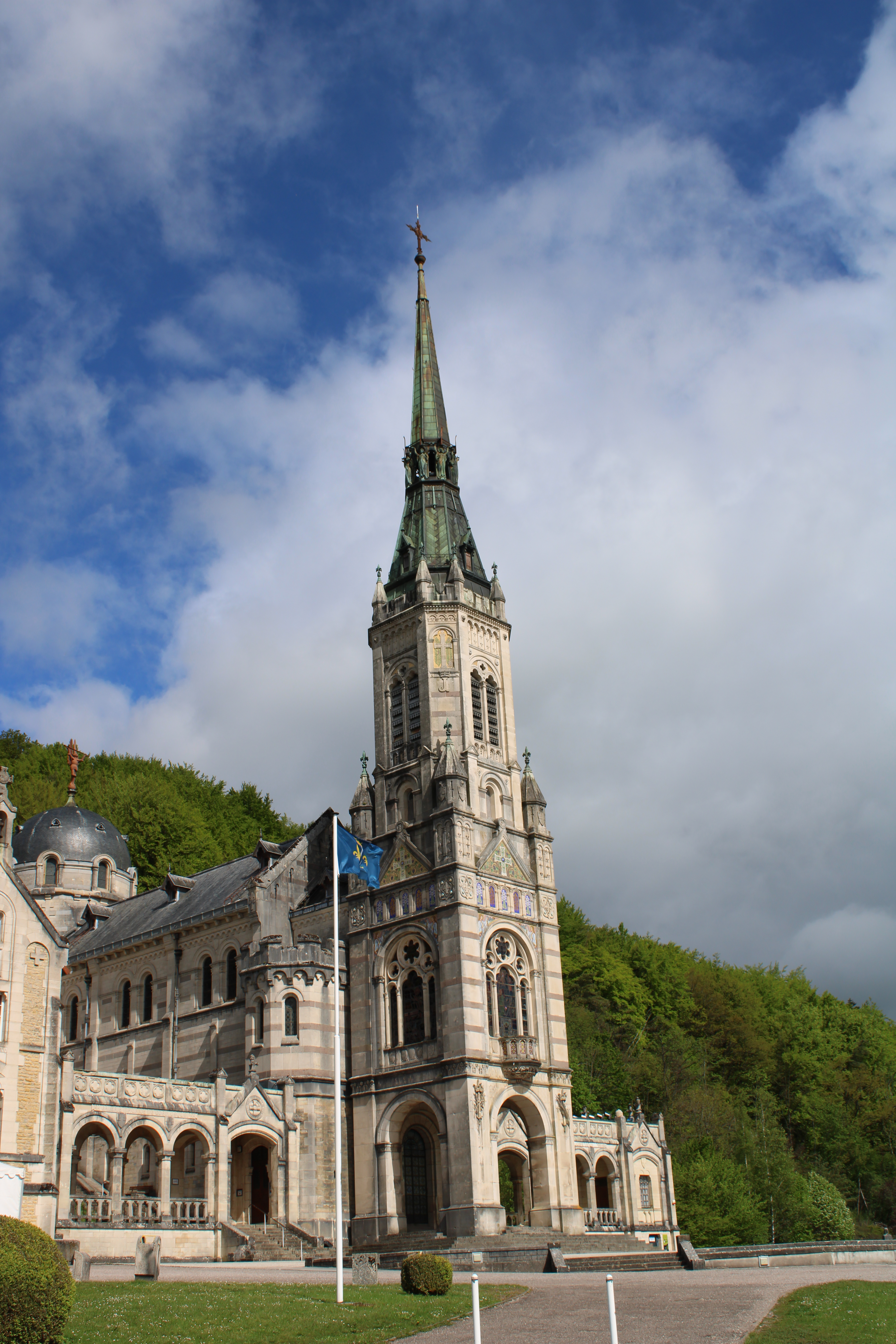 Vue de la basilique